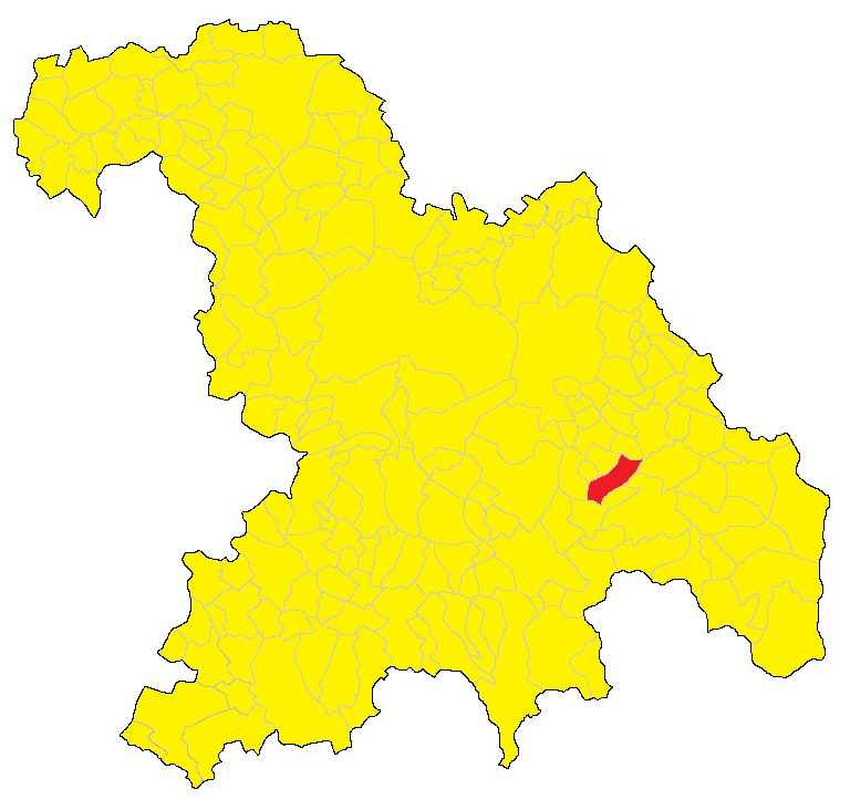 Mappa del comune di Sardigliano (AL)